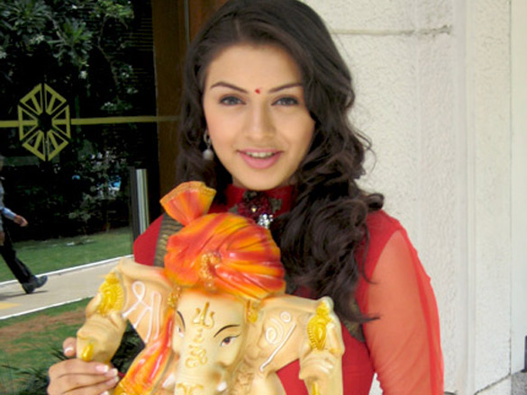 Hansika Motwani celebrating Ganesh festival